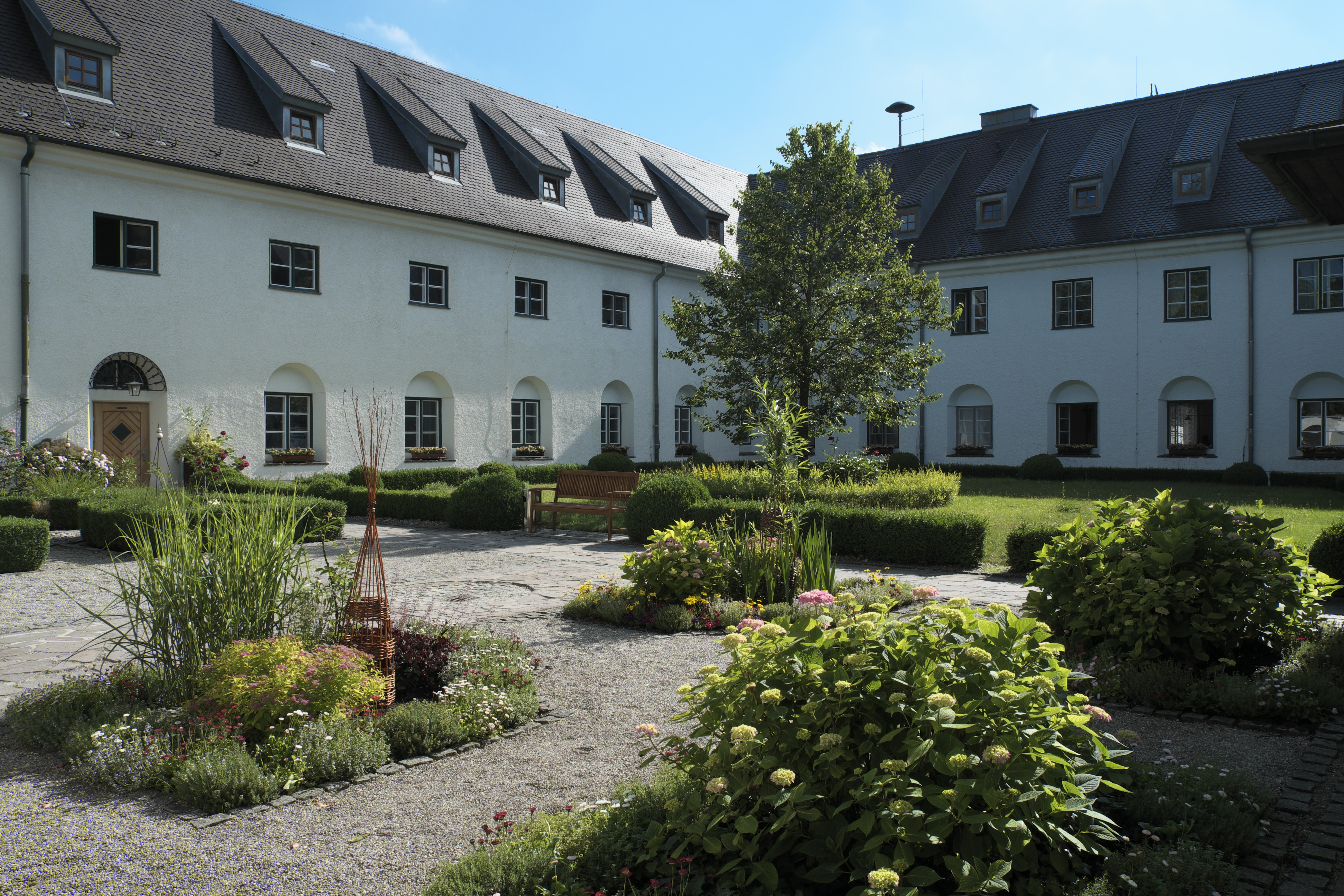 Ehemaliges Franziskanerkloster Mittenheim, heute Hans-Scherer-Haus, in Mittenheim (Oberschleißheim) im Landkreis München (Bayern, Deutschland)